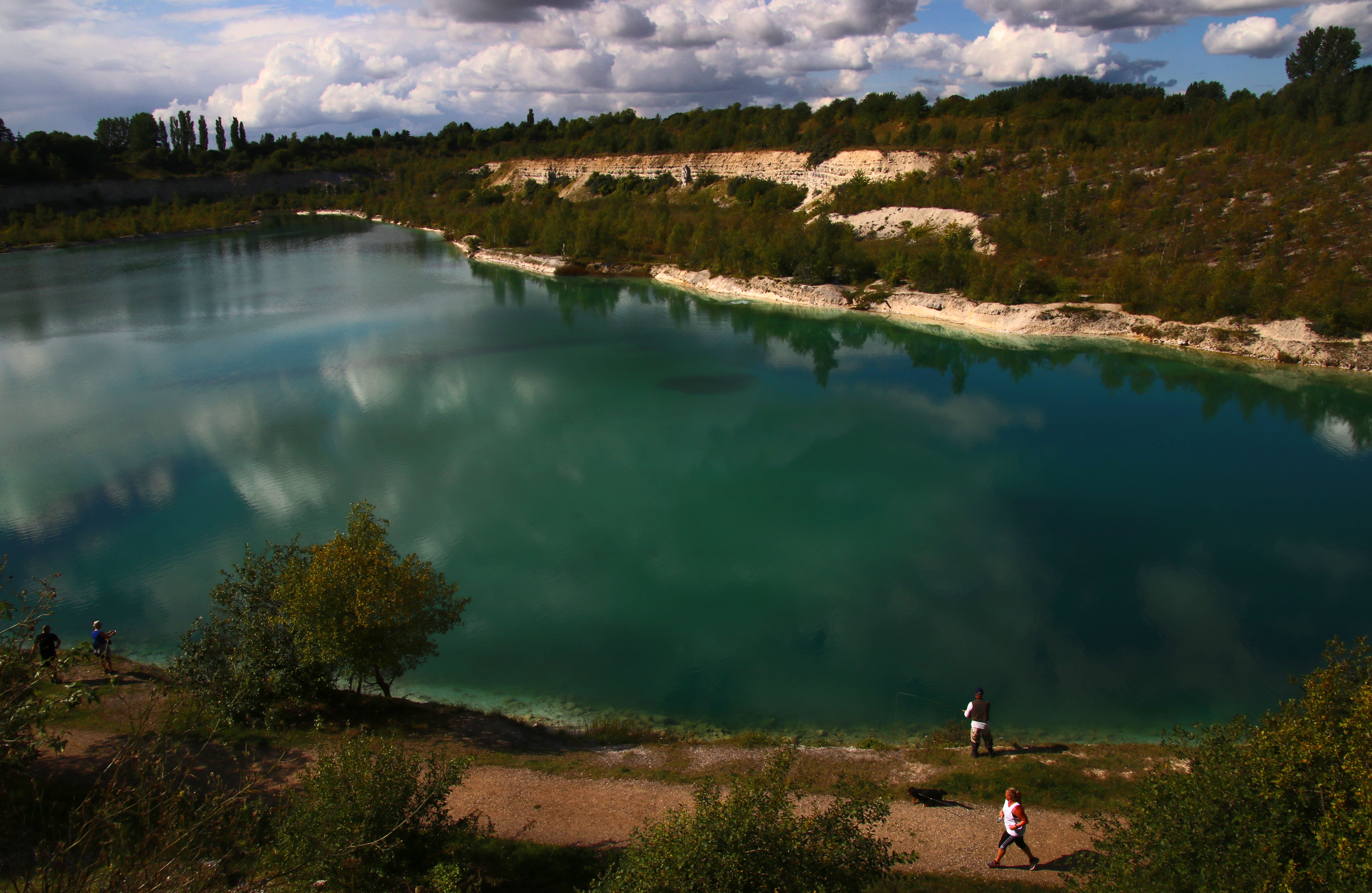 Karlslunde. På Karlstrup Kalkgrav.